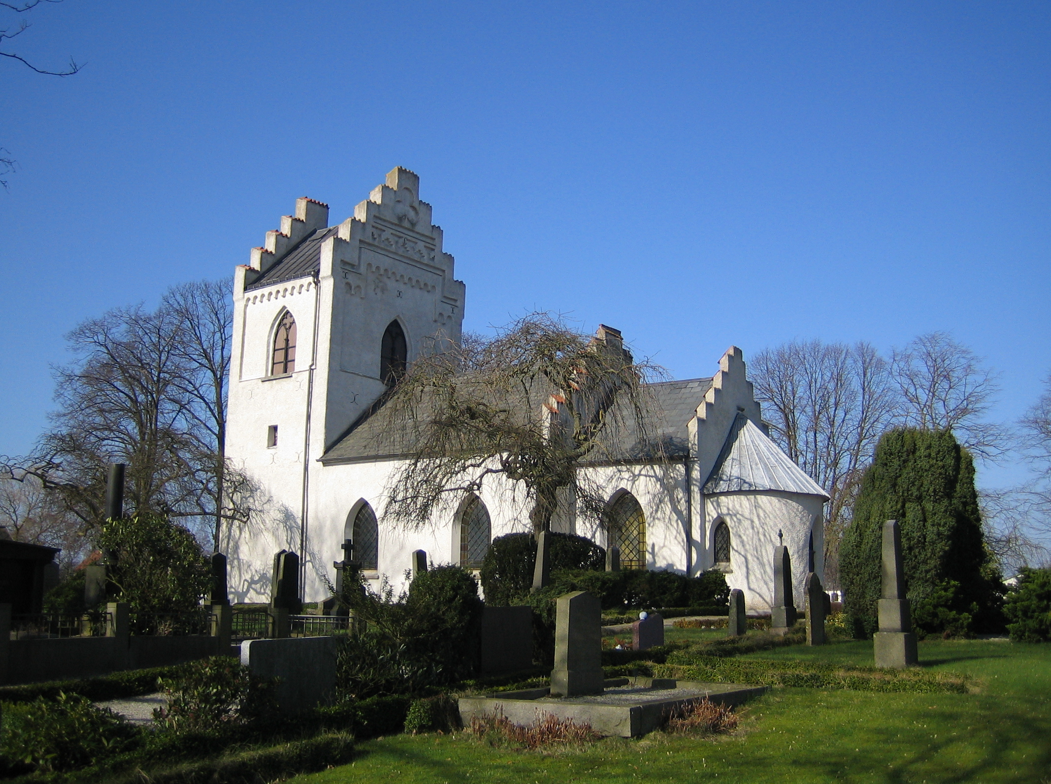 Högs kyrka in Skåne, Sweden